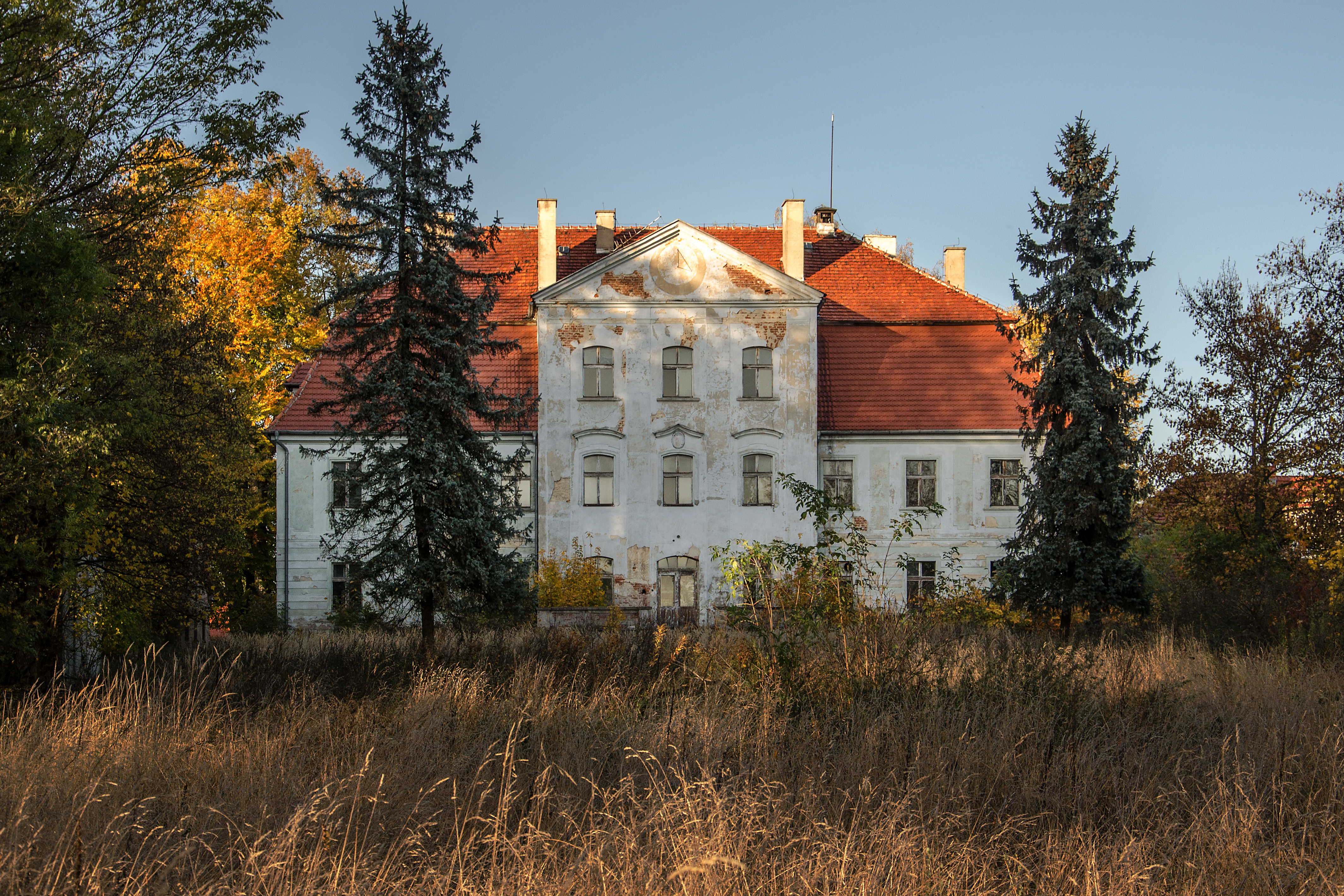 Tuły, pałac, XVIII, 1856-57